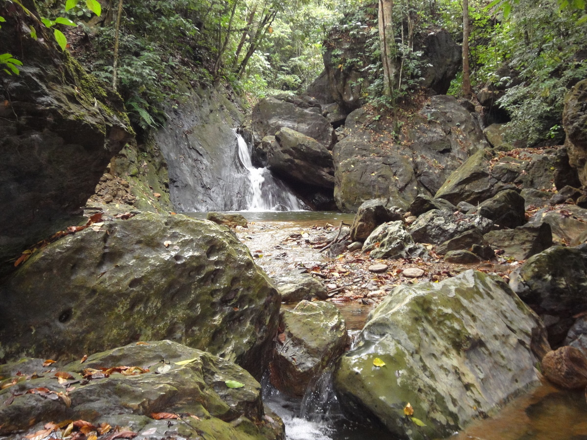 La Bella Poza Azul en La Ceiba - Mapire Peninsula de Paria - Estado Sucre